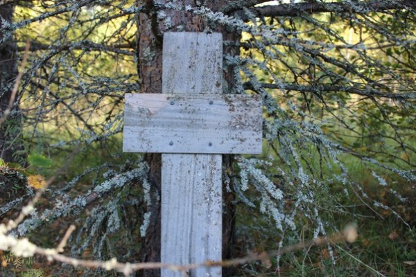 Деревянный крест в память о финских солдатах-диверсантах, погибших 12 февраля 1942 года. Установлен 30 мая 2003 года активистами финской организации "ПРО-Карелия". Надпись: Разведывательная группа Илмари Хонканена Юсси Косола Матти Хейман Вильё Халме Лаури Хинтсанен Каарло Коскинен Пали в бою в «Петровском Яме» 12.2.1942